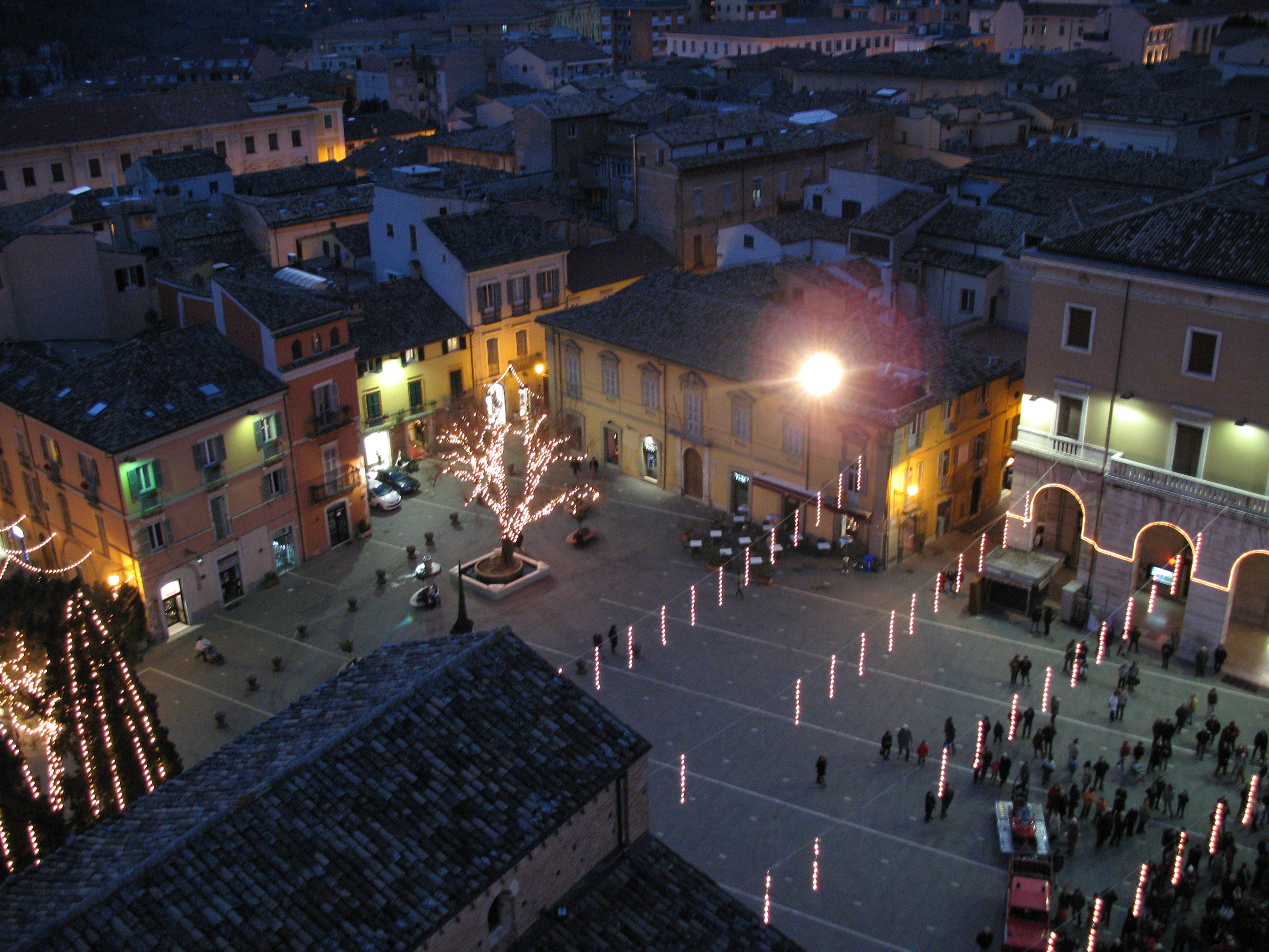 Scorcio Piazza Martiri - Teramo